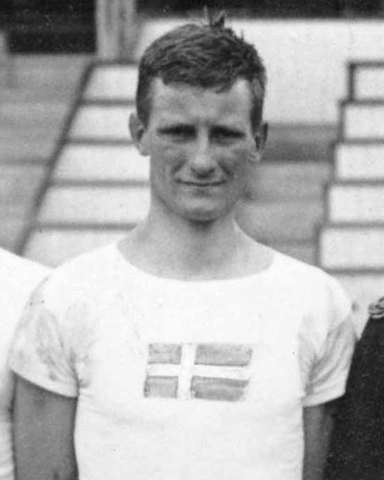 Erik de Laval, Antwerpen Olympics